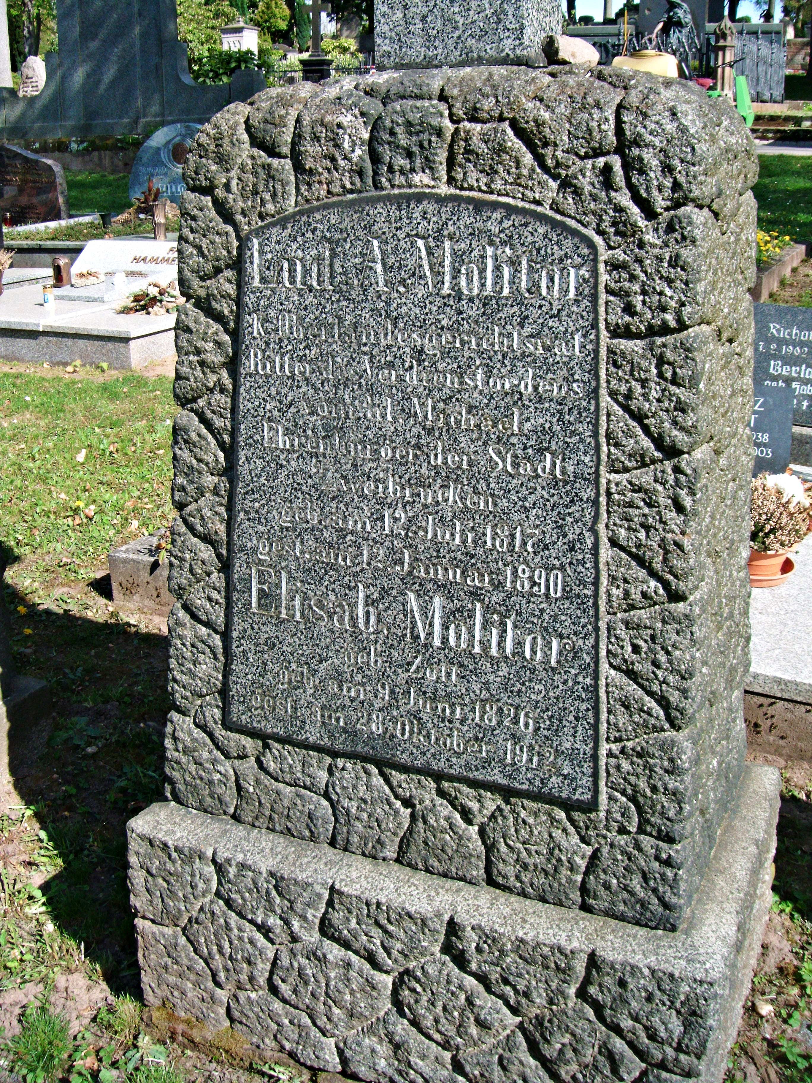 Ludwig Alois Molitor (1817-1890), bayerischer Richter, Komponist und Heimatgeschichtler, Grabstein, Hauptfriedhof Zweibrücken